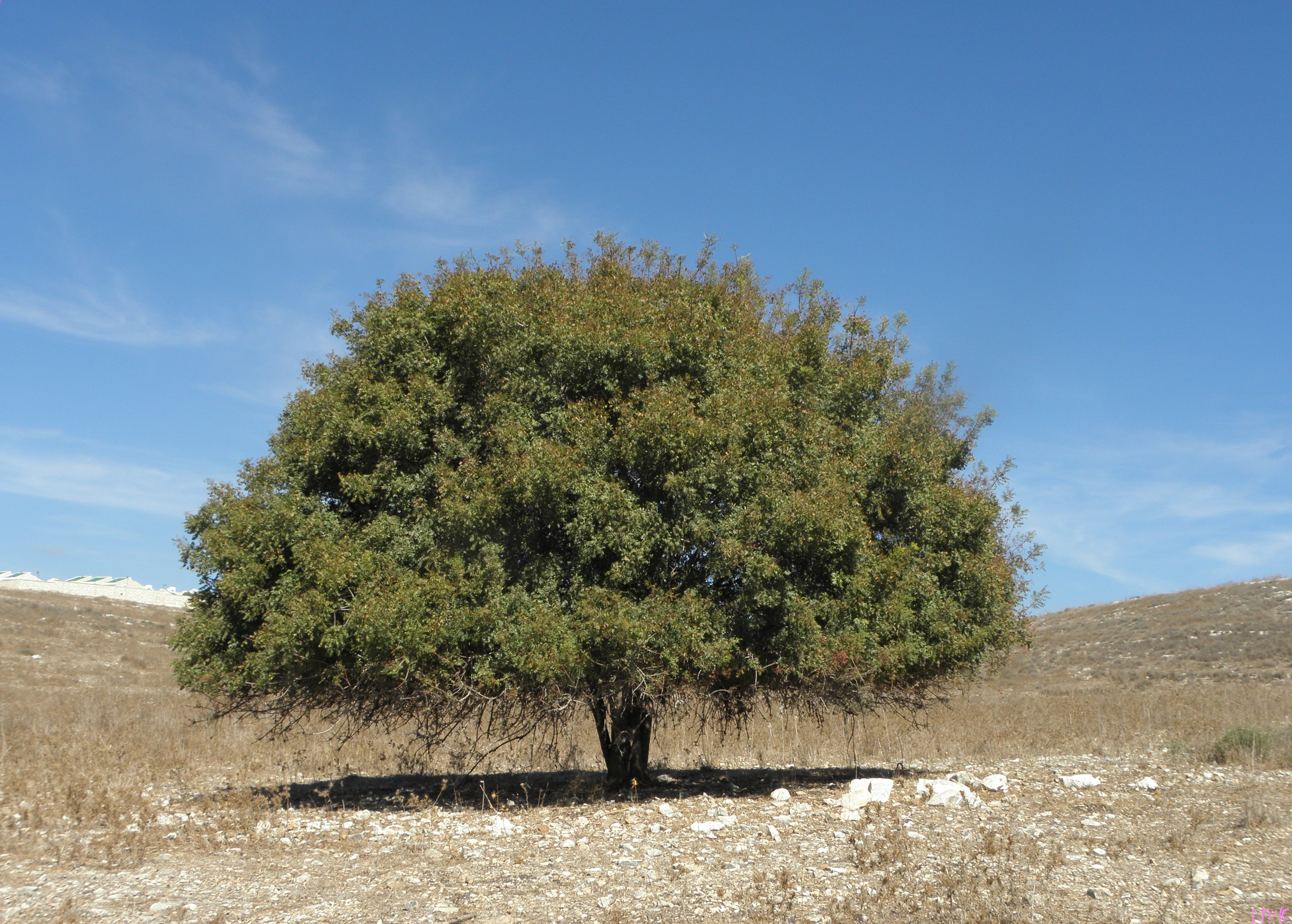 Pistacia palaestina, terebinth אלה ארץ ישראלית, נחל סנין